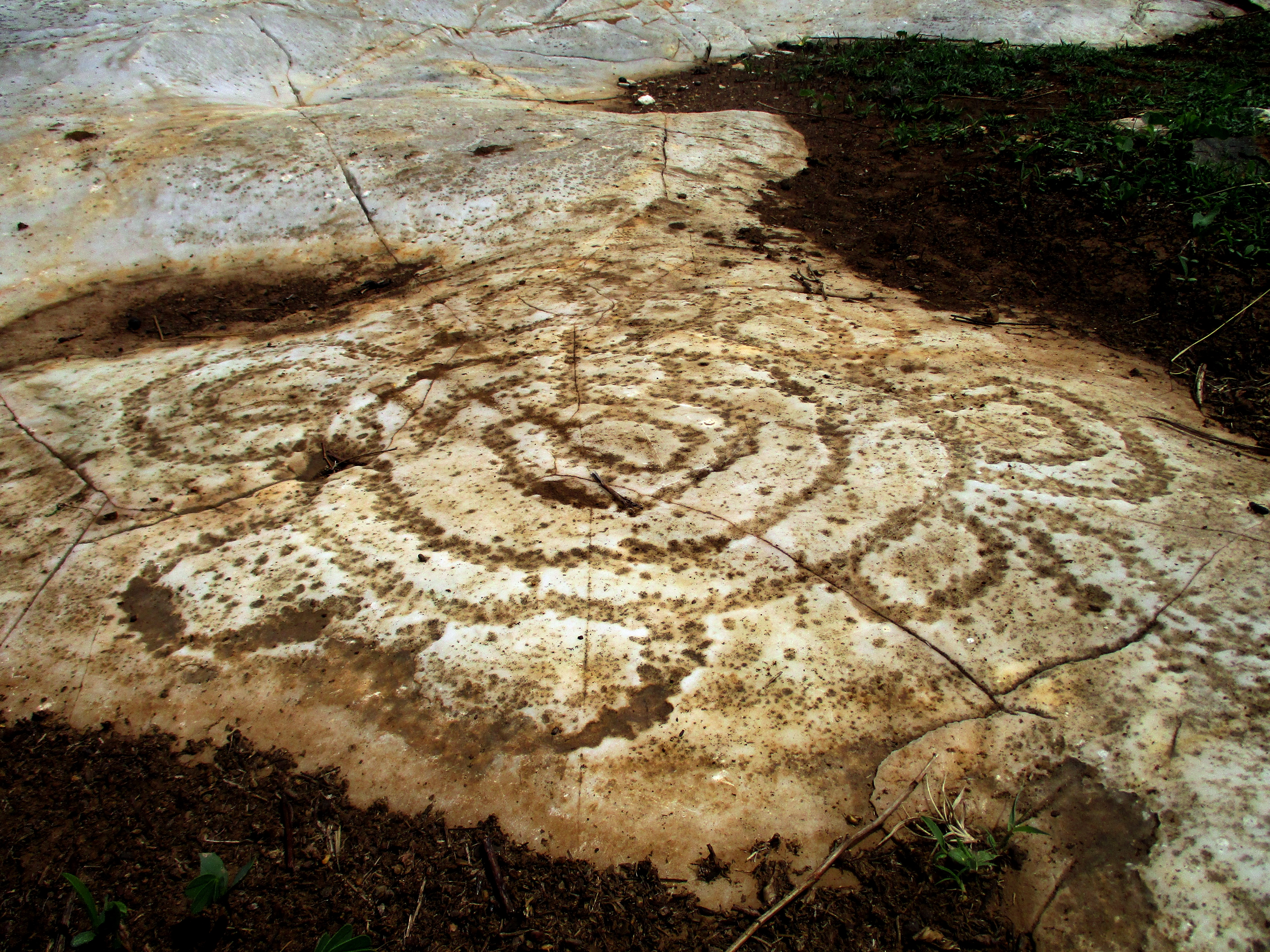 Les gravures rupestres du site archéologique de Bidzar, situées sur la route nationale numéro 1 entre Figuil et Maroua. Gravures ayant plusieurs siècles d'existences.